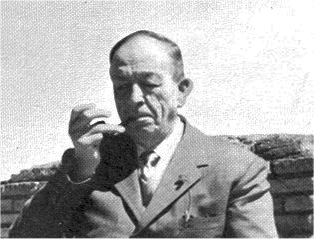 Giovanni Clemente Cassis